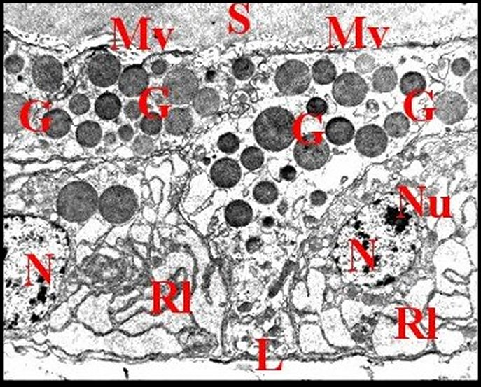 Cellules de glande prégonoporale d' Araneus sericatus avec leurs organites. Vue au microscope électronique à transmission.